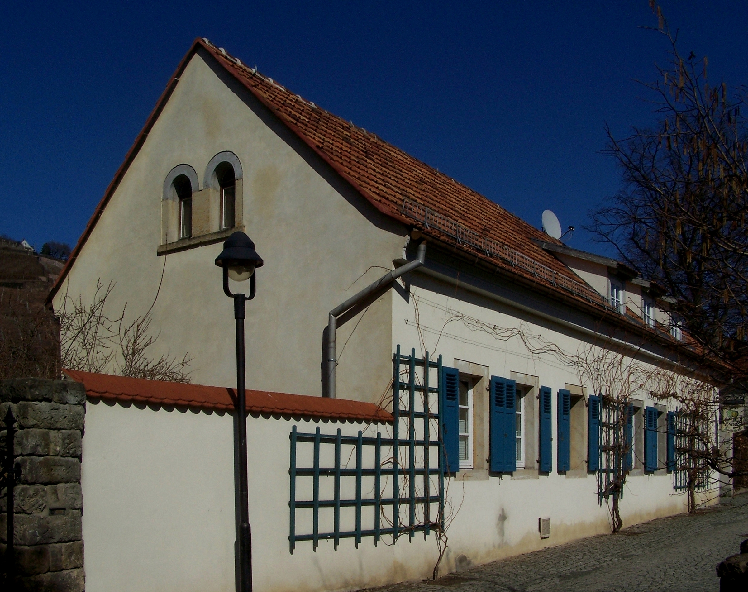 Weinbergstr. 16 in Radebeul, Seitenhaus des Winzerhaus Barth